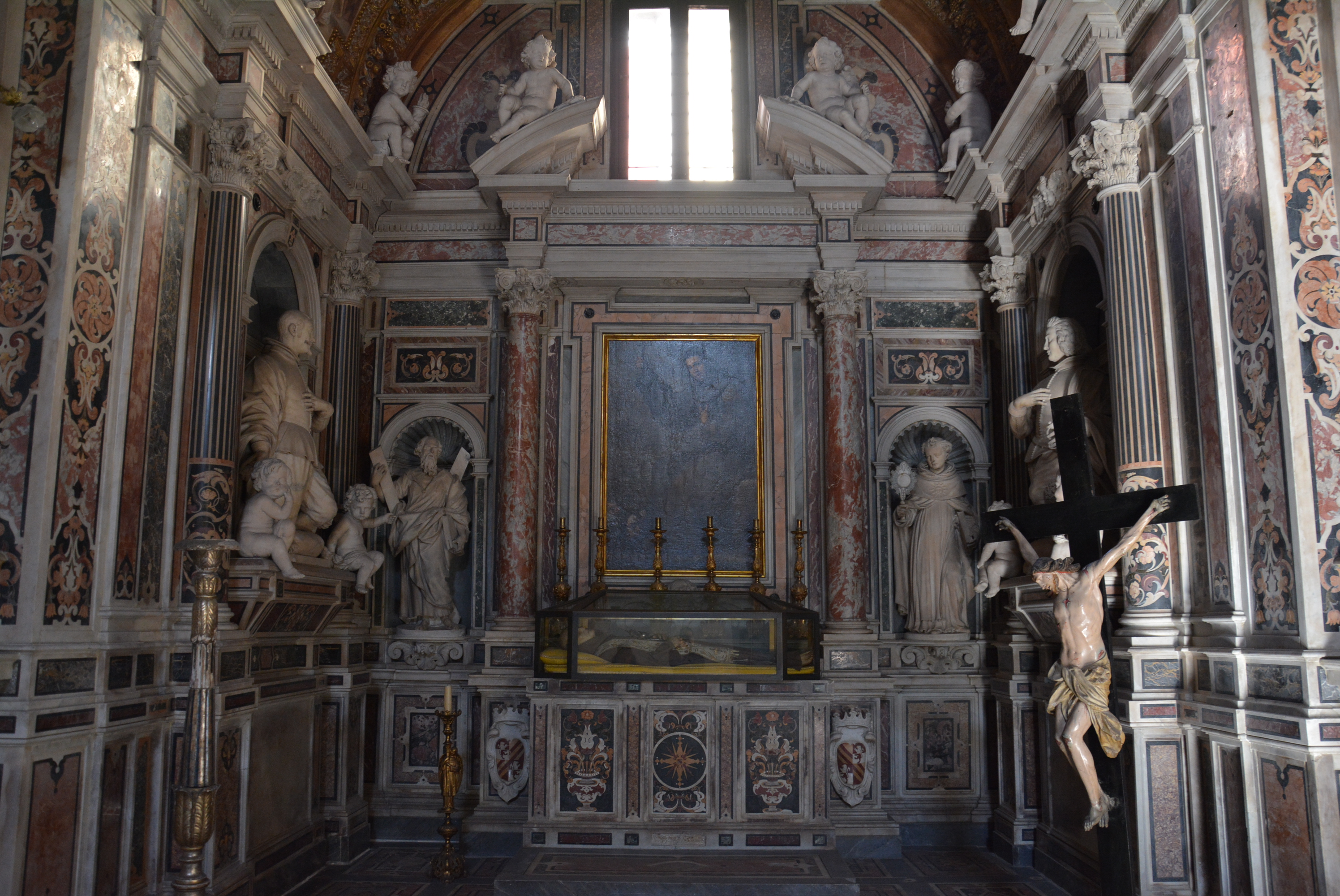 Cappellone di San Giacomo della Marca nella chiesa di Santa Maria la Nova a Napoli